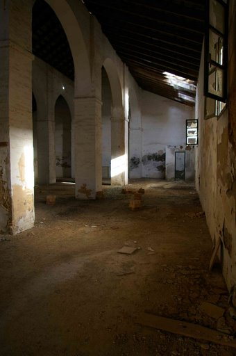 Bodega de la Casa de Arizón en Sanlúcar de Barrameda